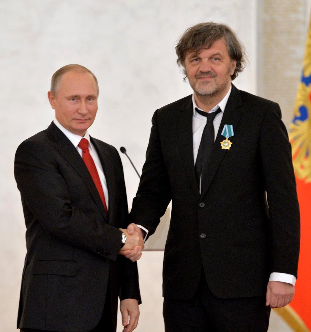 На торжественном приёме по случаю Дня народного единства Владимир Путин вручил орден Дружбы кинорежиссеру Эмиру Кустурице.